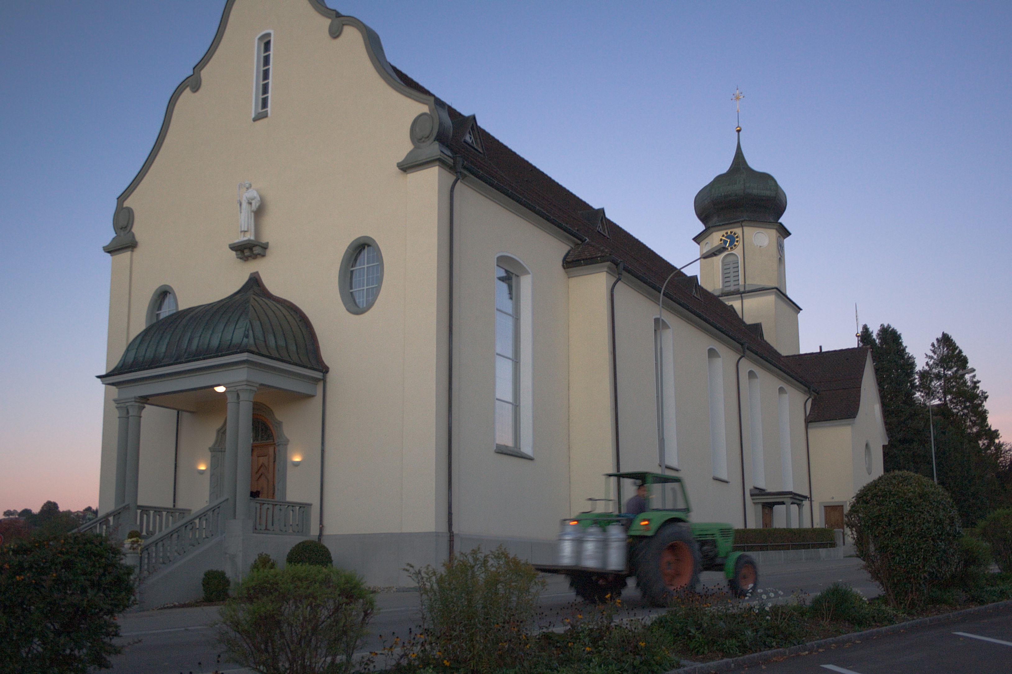 Die (katholische) Kirche in Andwil (SG), Schweiz